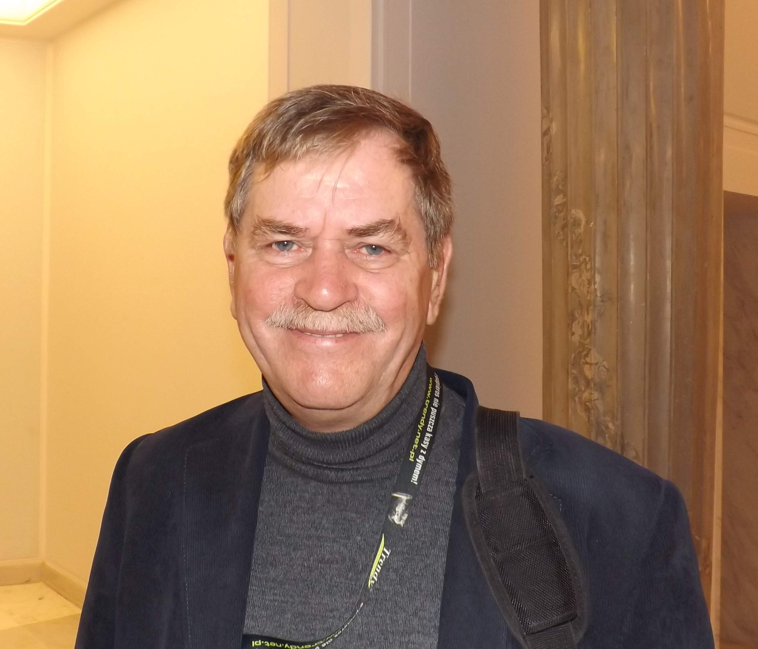 Krzysztof Janik, były poseł SLD, w Sejmie 9.11.2013